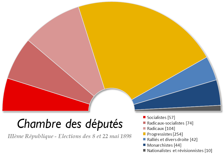 Chambre des députés française issue des élections législatives de 1898